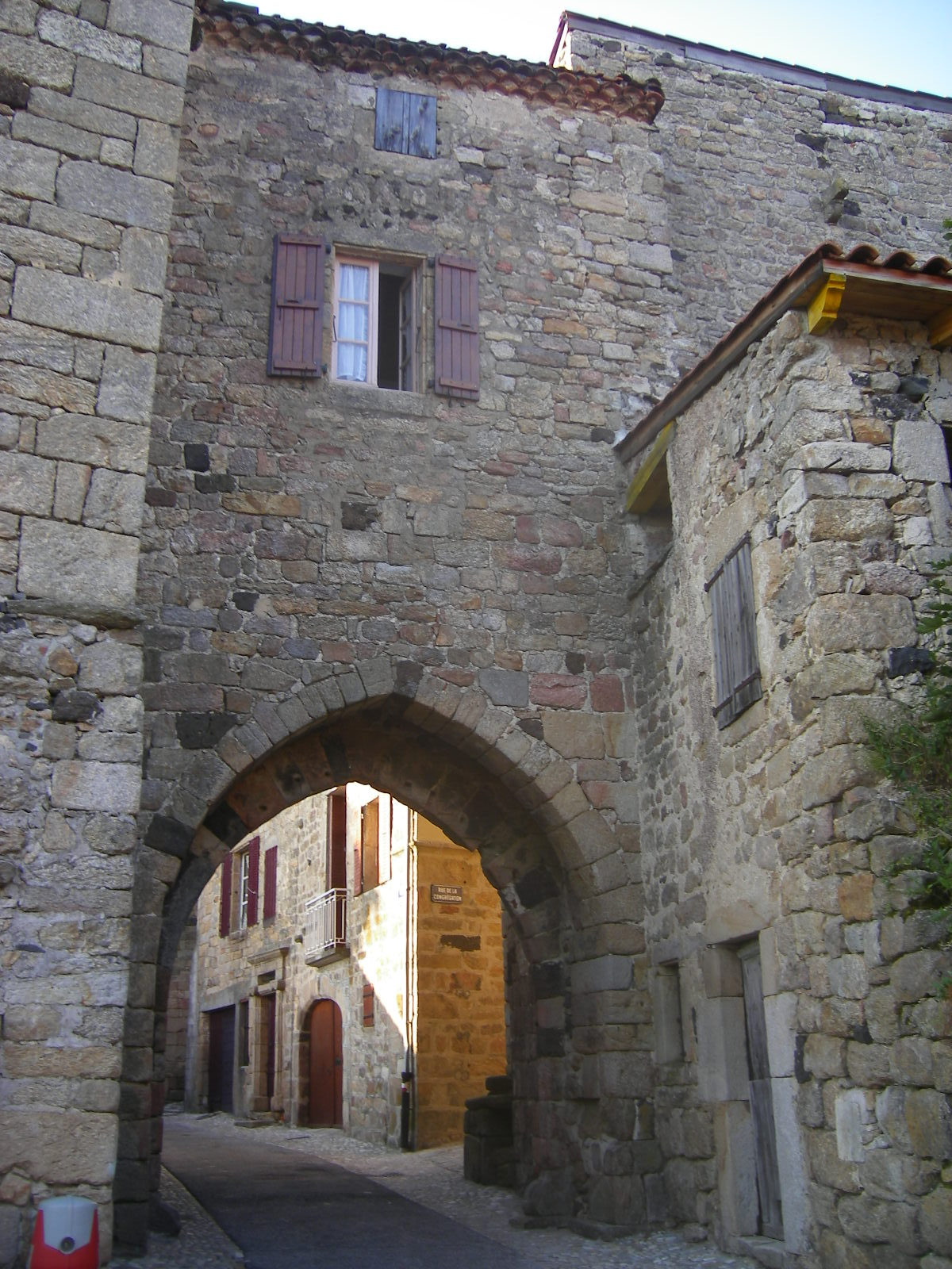 Pradelles